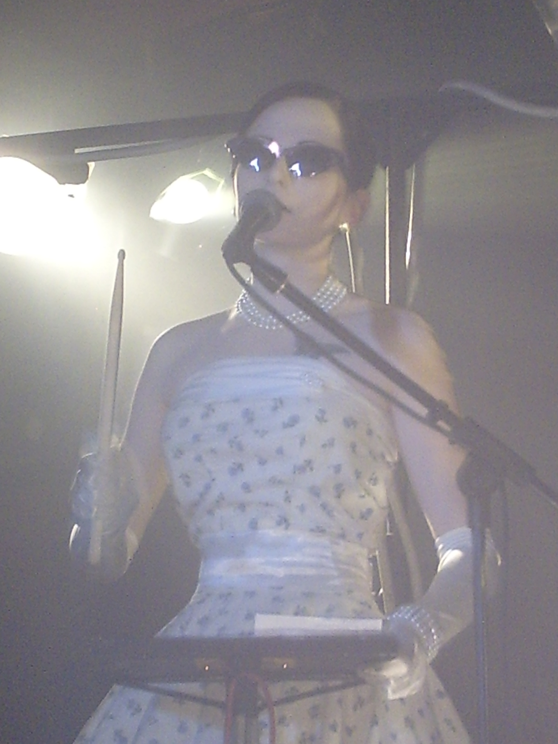 Bandphoto Welle Erdball (Plastique)